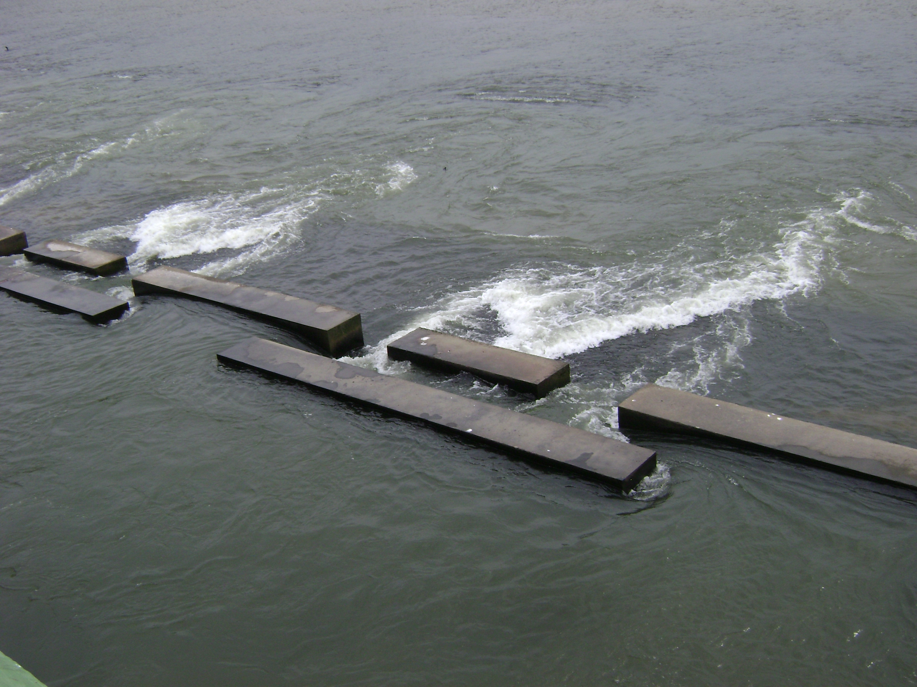 தமிழக சுற்றுலாத்தளங்கள் : கல்லணை கல்லணை சோழ மன்னனால் காவிரி ஆற்றுக்கு குறுக்கே கட்டப்பட்ட அணை ஆகும் . புகைப்படம் எடுக்கப்பட்ட தேதி : 23-12-2011